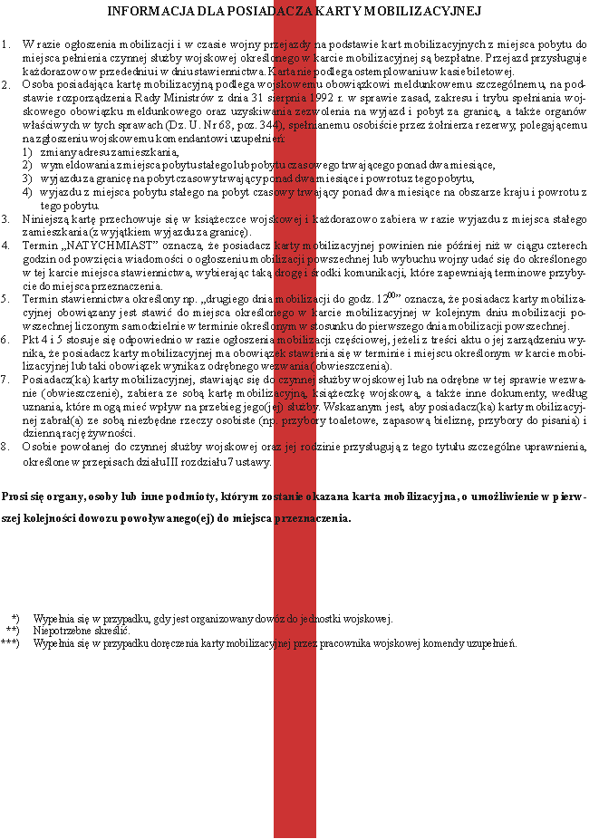 Karta mobilizacyjna z paskiem koloru czerwonego